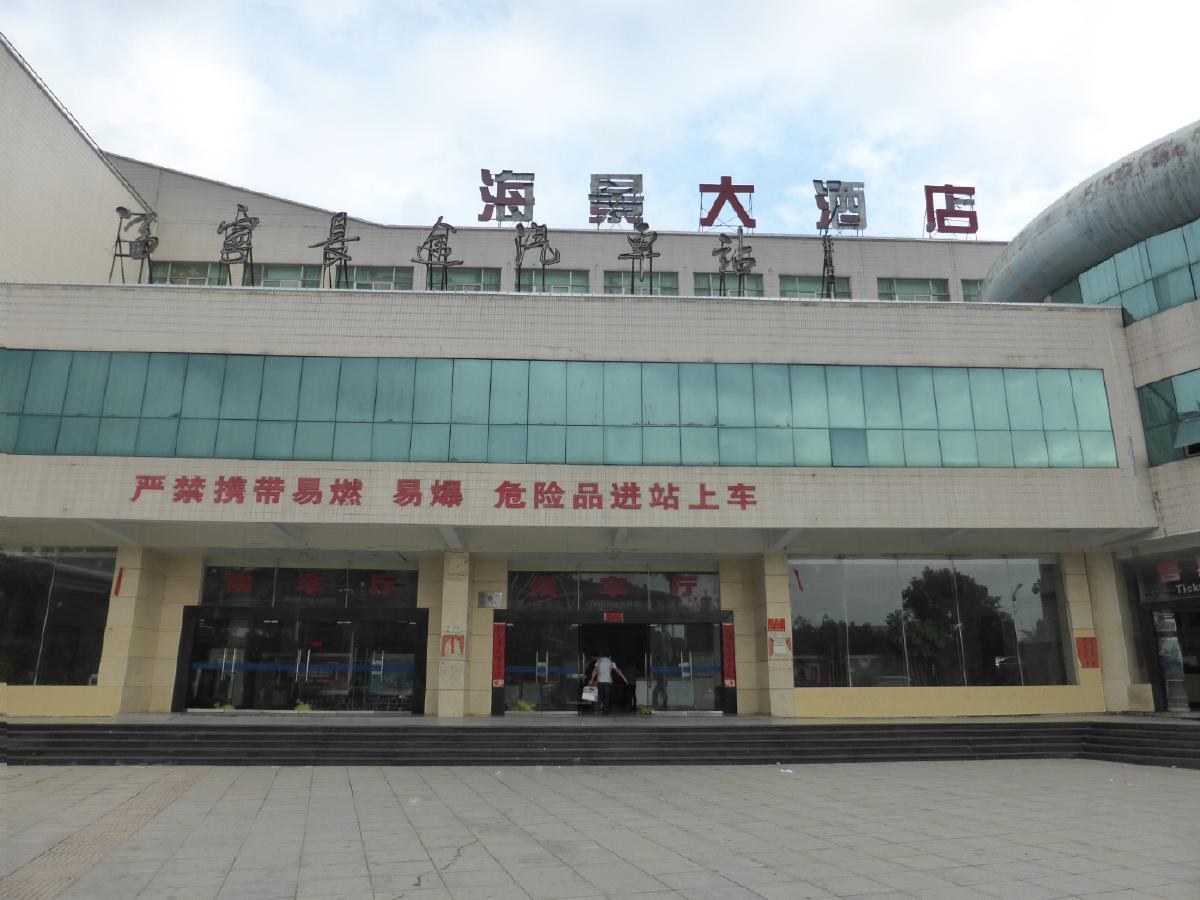 福寧長距離バスターミナル